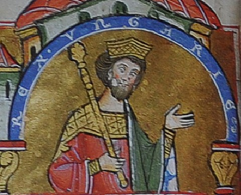 Ondřej II. Uherský